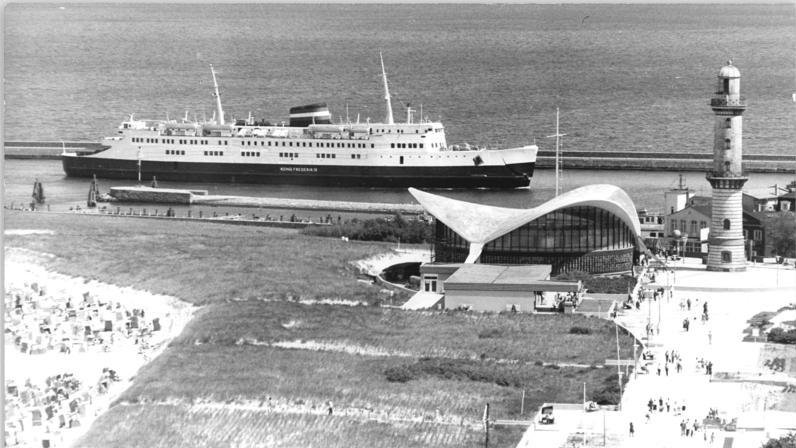 Warnemünde, Strand, Fährschiff, "Teepott", Leuchtturm ADN-ZB Sindermann 15.7.78 Bez.Rostock: Ihr 75 jähriges Jubiläum feiert in diesem Jahr die Fährschifflinie Warnemünde-Gedser. Mehrmals täglich verkehren das DDR-Fährschiff "Warnemünde" und das dänische Fährschiff "Kong Frederik IX." auf der 46 Kilometer langen Strecke zwischen der DDR und Dänemark. Information added by Wikimedia users.Dänische Eisenbahnfähre Kong Frederik IX. der Fährstrecke Gedser-Warnemünde im Hafen von Warnemünde